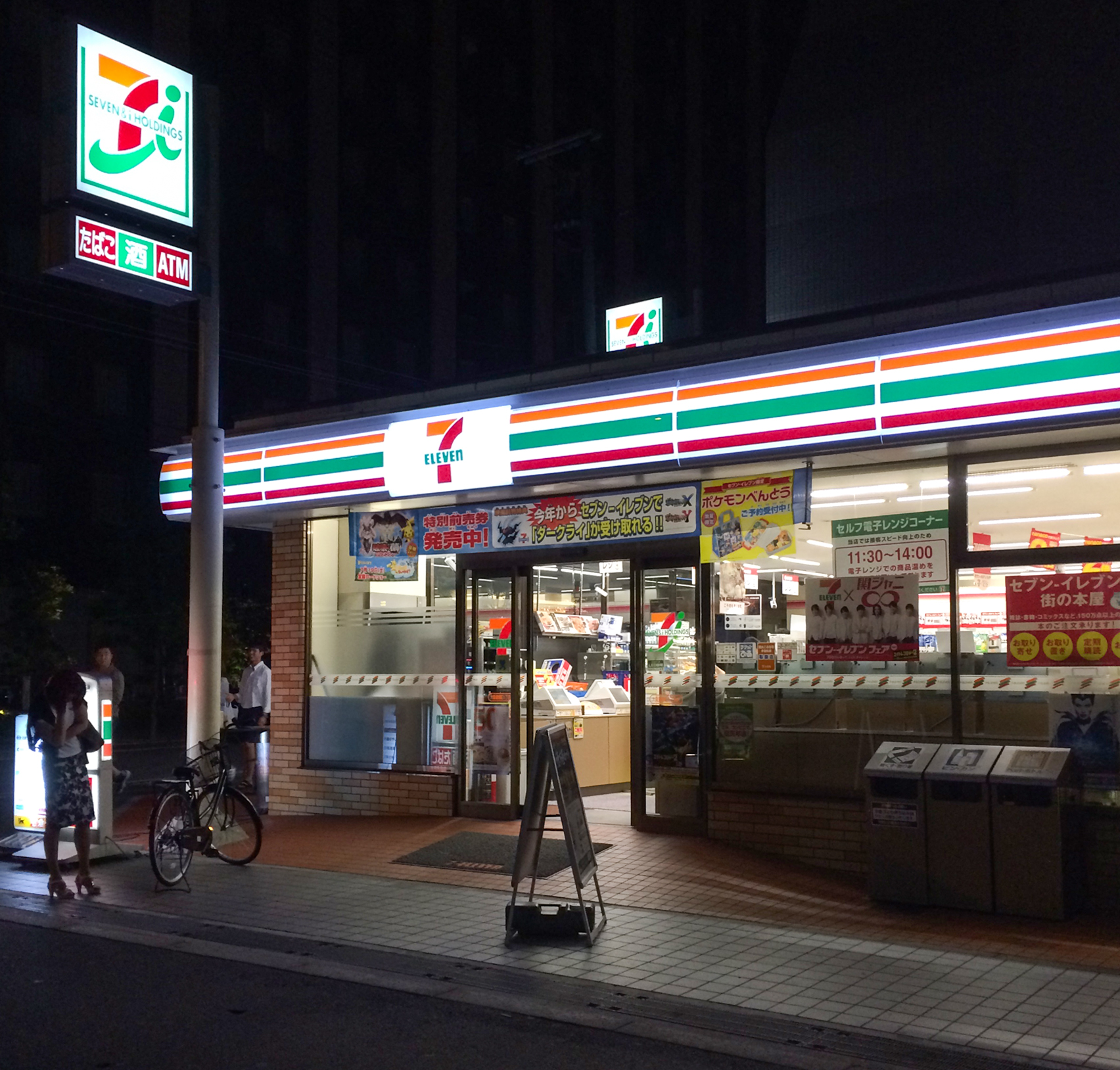 7-Eleven in Osaka